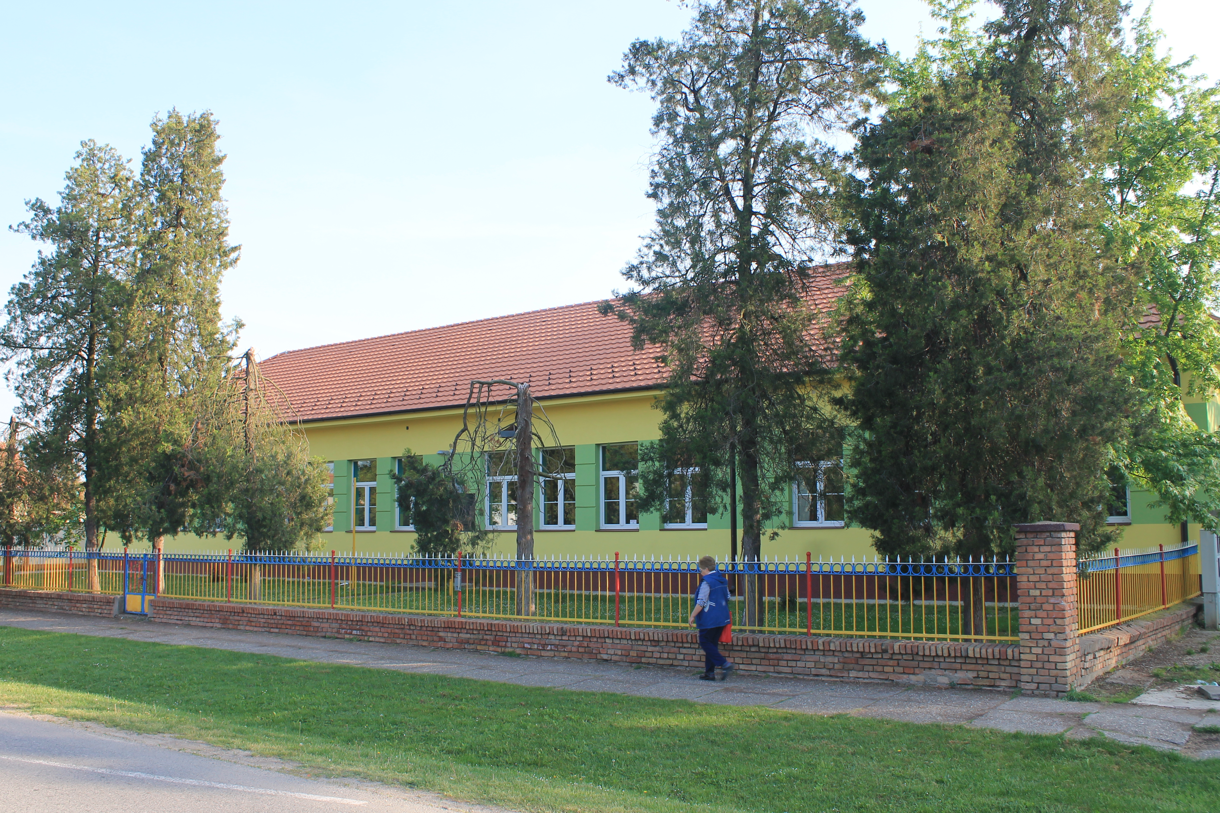 Jarak-centar sela